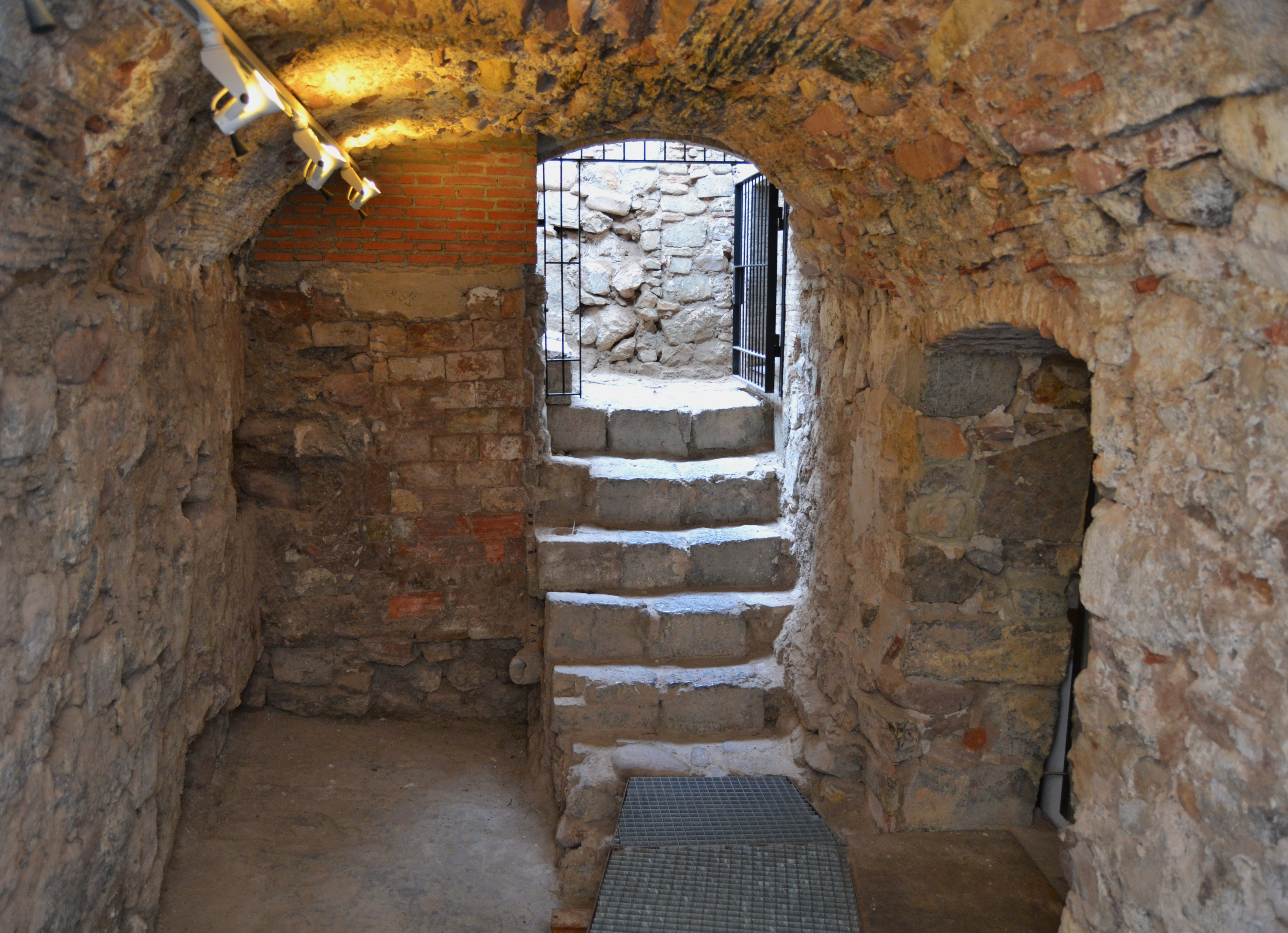 Possible Micvé, bany ritual jueu a la casa dels Berenguer de Sagunt. És una estança voltada construïda amb maçoneria irregular. Es realitzaven ritus de purificació com les conversions, en festivitats importants i en purificacions matrimonials. El seu ús com a aljub en època contemporània pot haver produït la desaparició dels nivells medievals originals.